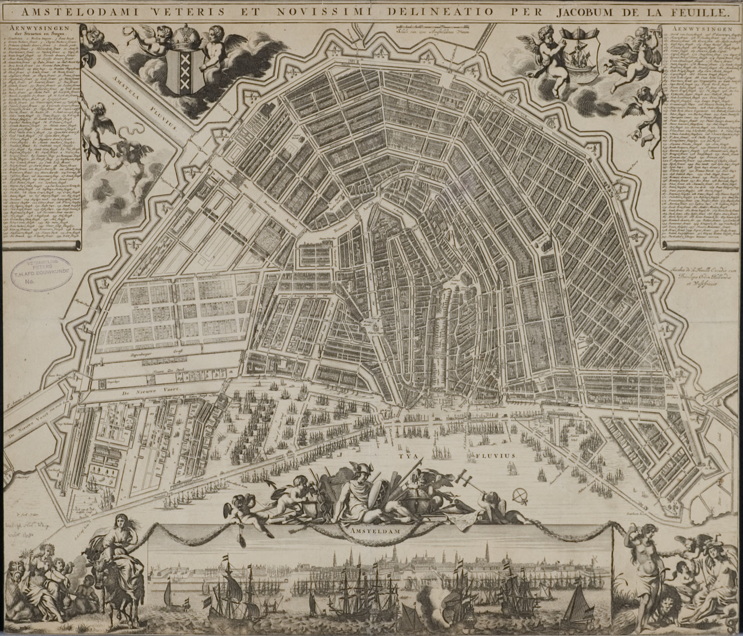 "AMSTELODAMI VETERIS ET NOVISSIMI DELINEATIO PER JACOBUM DE LA FEUILLE."; gebouwen en schepen in scheve projectie; noorden rechtsonder; legenda voor gebouwen en straten; middenonder: "AMSTELDAM"; stadsprofiel vanuit het noorden